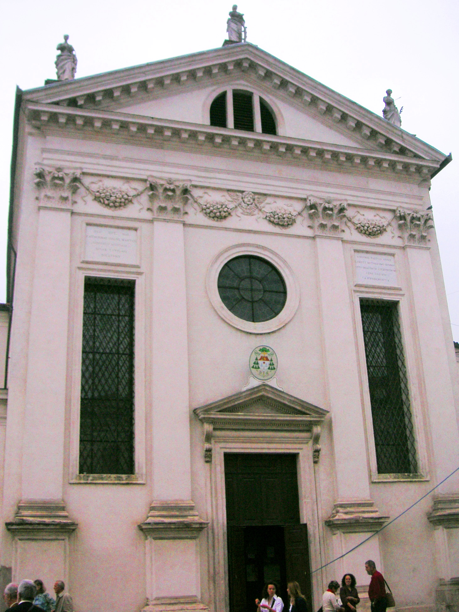 Chiesa di Santa Caterina in Vicenza - Facciata della metà del XVII secolo